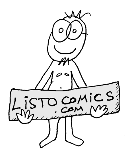 Imagen promocional de la web de El Listo, por Xavier Àgueda